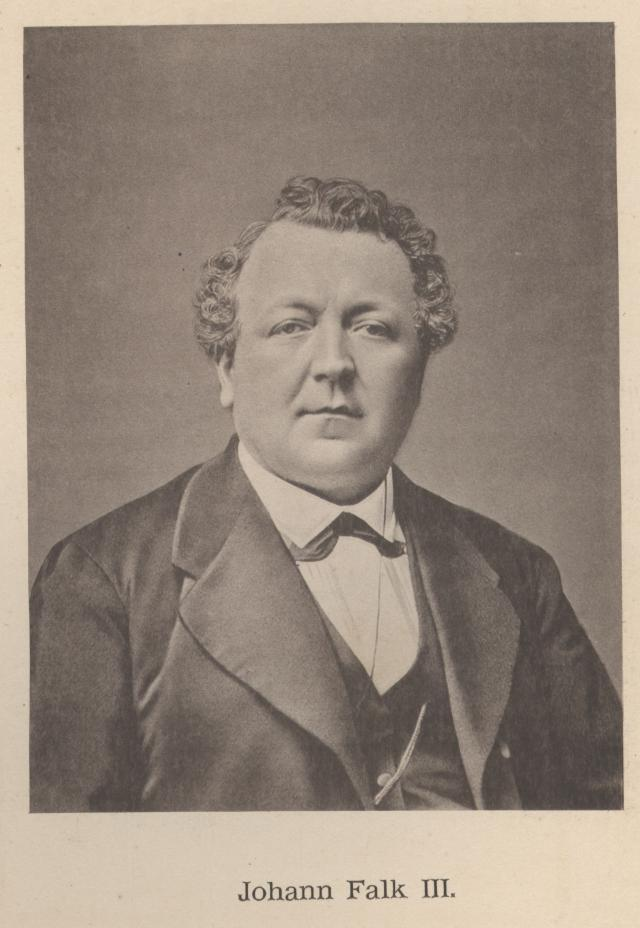 Johann Falk (1825-1905) Hessischer Landtagsabgeordneter und katholischer Publizist, Mainz